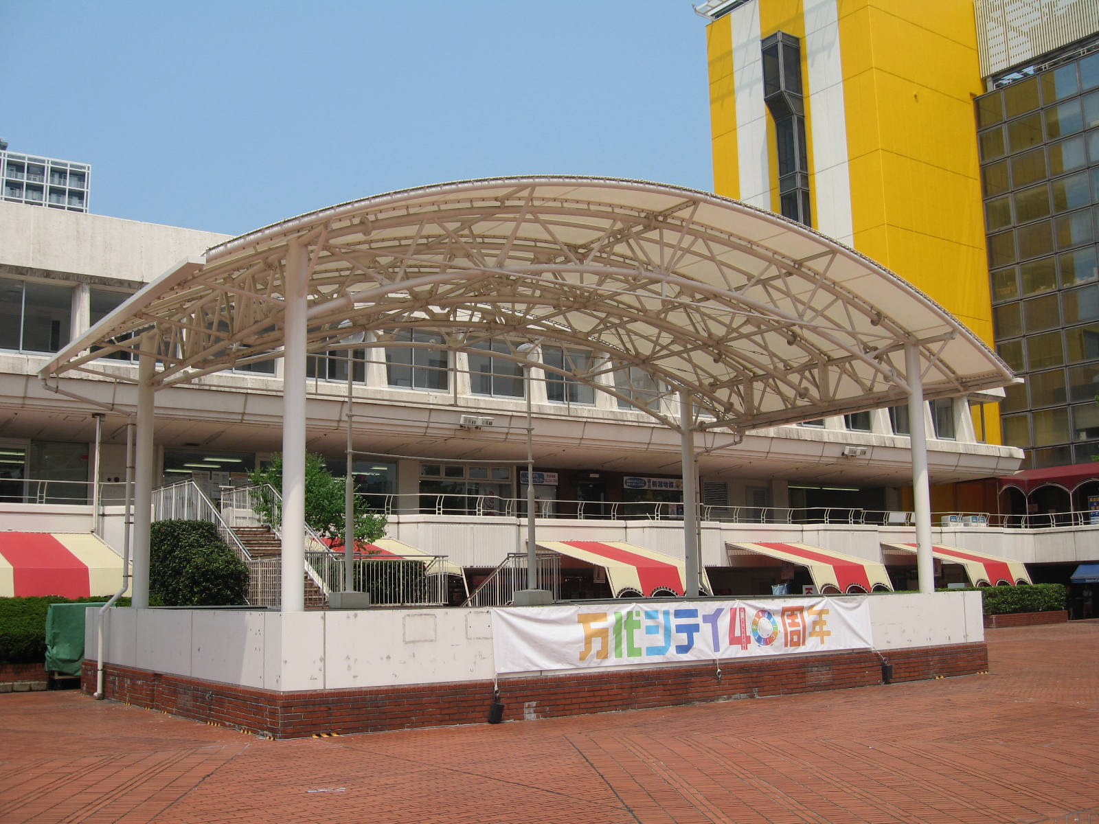 新潟市中央区。万代シテイ2階の屋外ステージ。